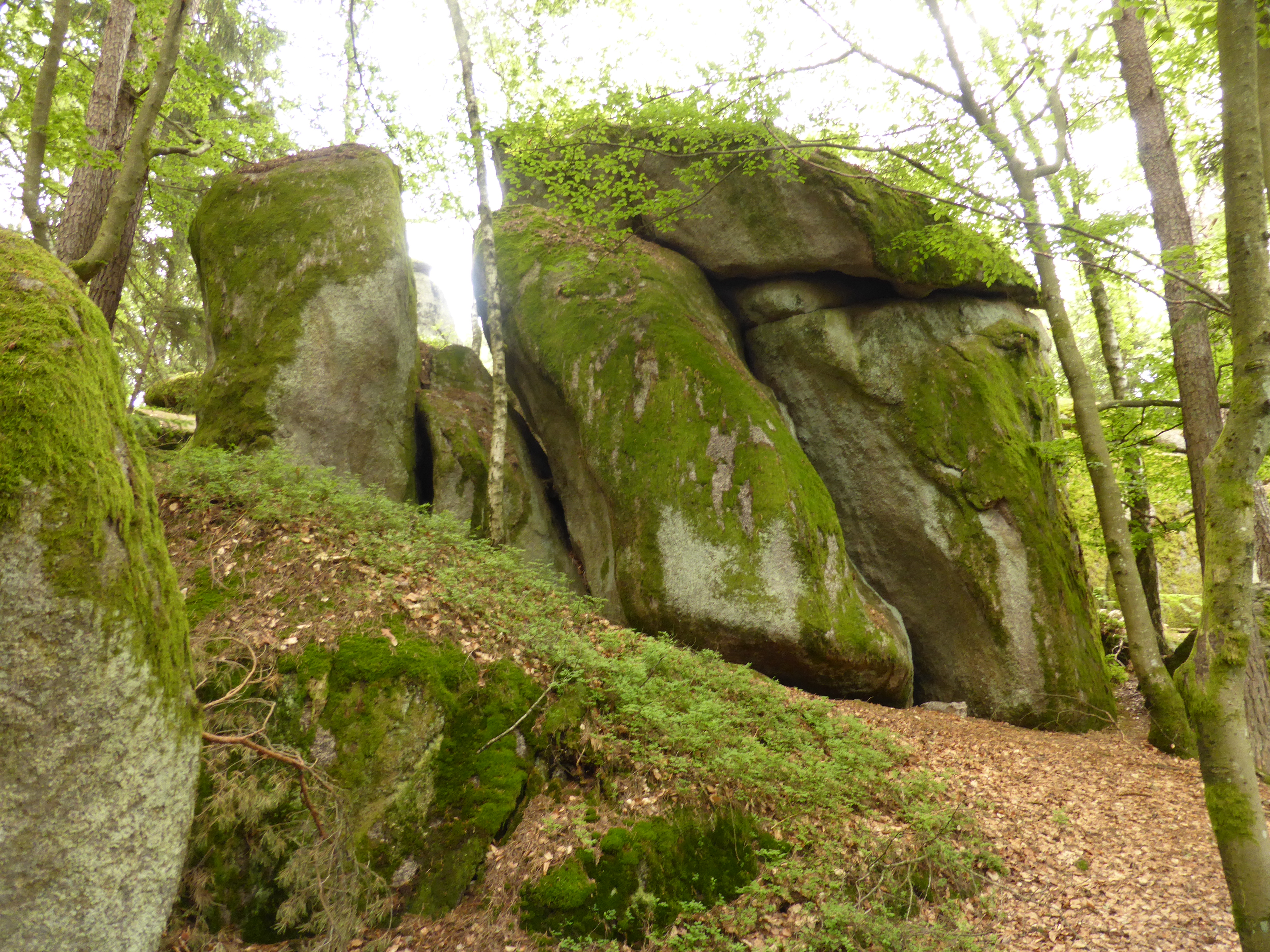 Felsformation "Steinernes Kirchlein im Wald bei Entschenreuth. Geotop im Landkreis Freyung-Grafenau.